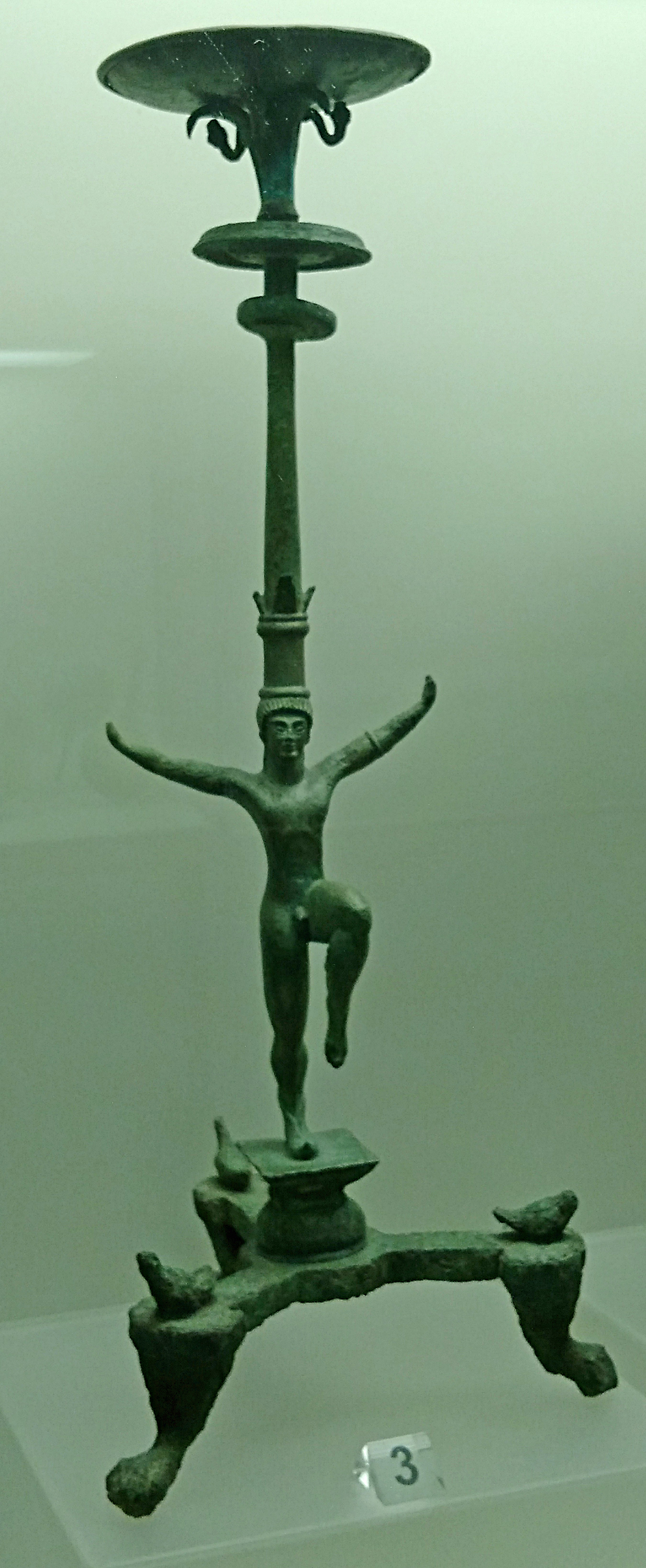 Encensoir (thymiaterion) de Vulci en bronze. 2ème moitié du 6ème s. av. JC.